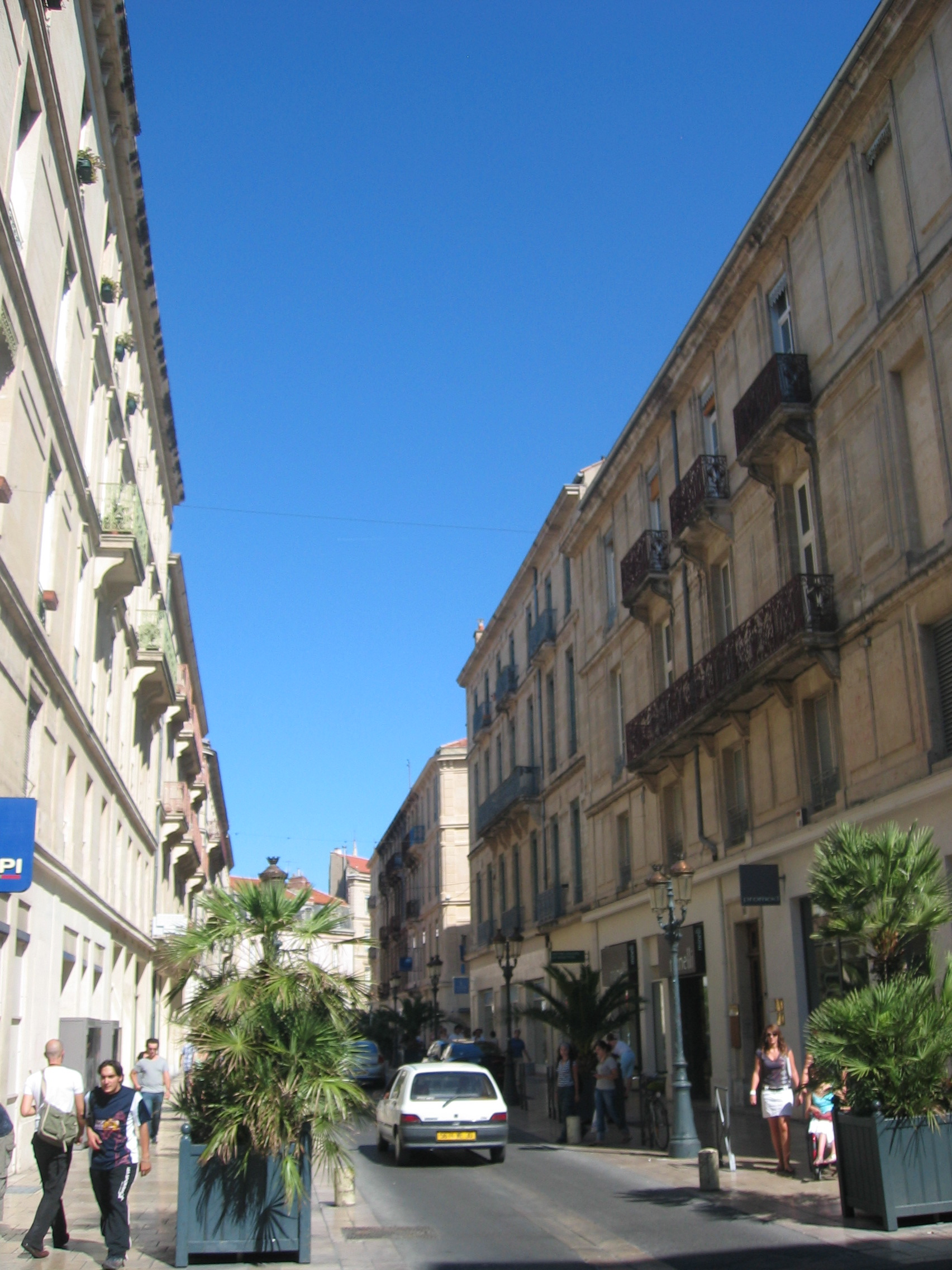 La Rue du Général Perrier à Nîmes (Gard, Languedoc-Roussillon, France).